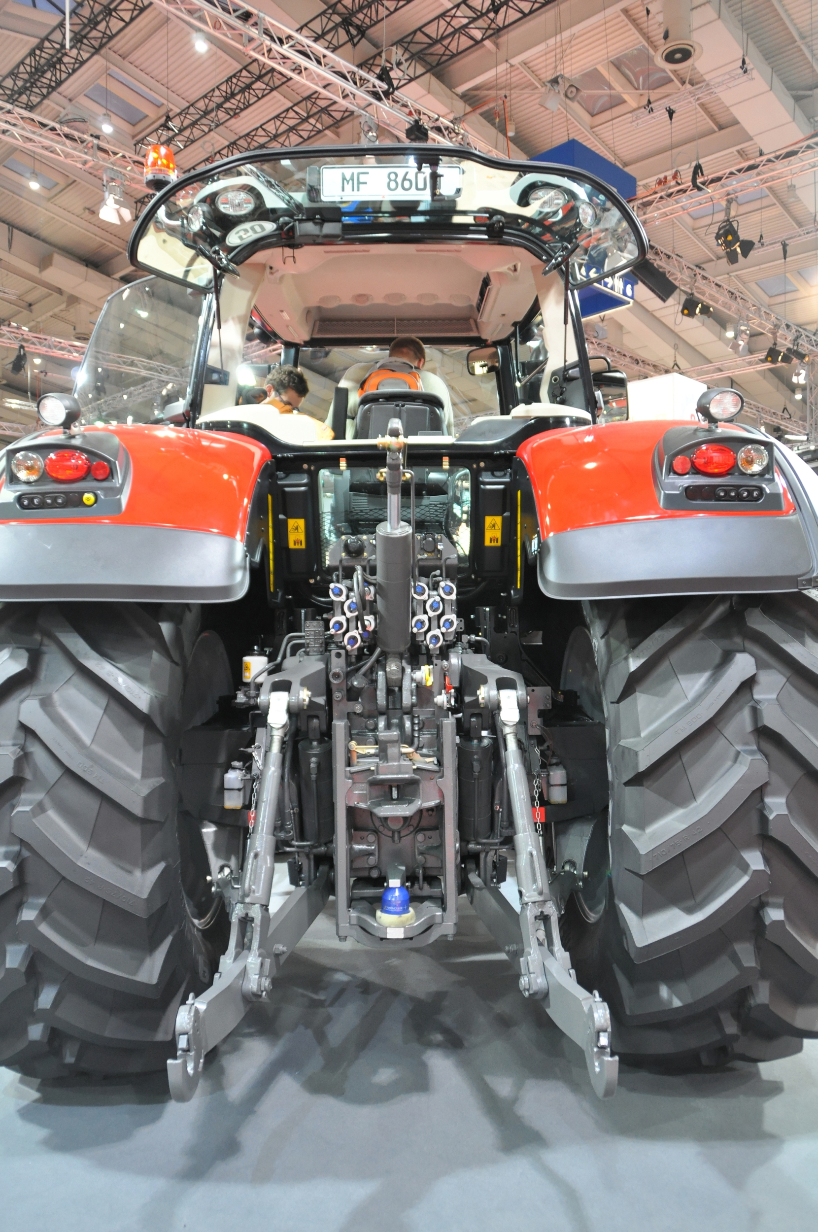 Heckansicht Massey Ferguson 8690 (K80 Zug-Kugelkupplung von Scharmüller mittig im unteren Bilddrittel, darüber Bolzenkupplung); Agritechnica 2011 Dieses Foto entstand durch die Mithilfe der Wikimedia Deutschland e. V. bei der Akkreditierung als Fotograf. Wikimedia Deutschland e. V. hilft den Freiwilligen der Wikipedia bei der Erstellung von freien Inhalten.